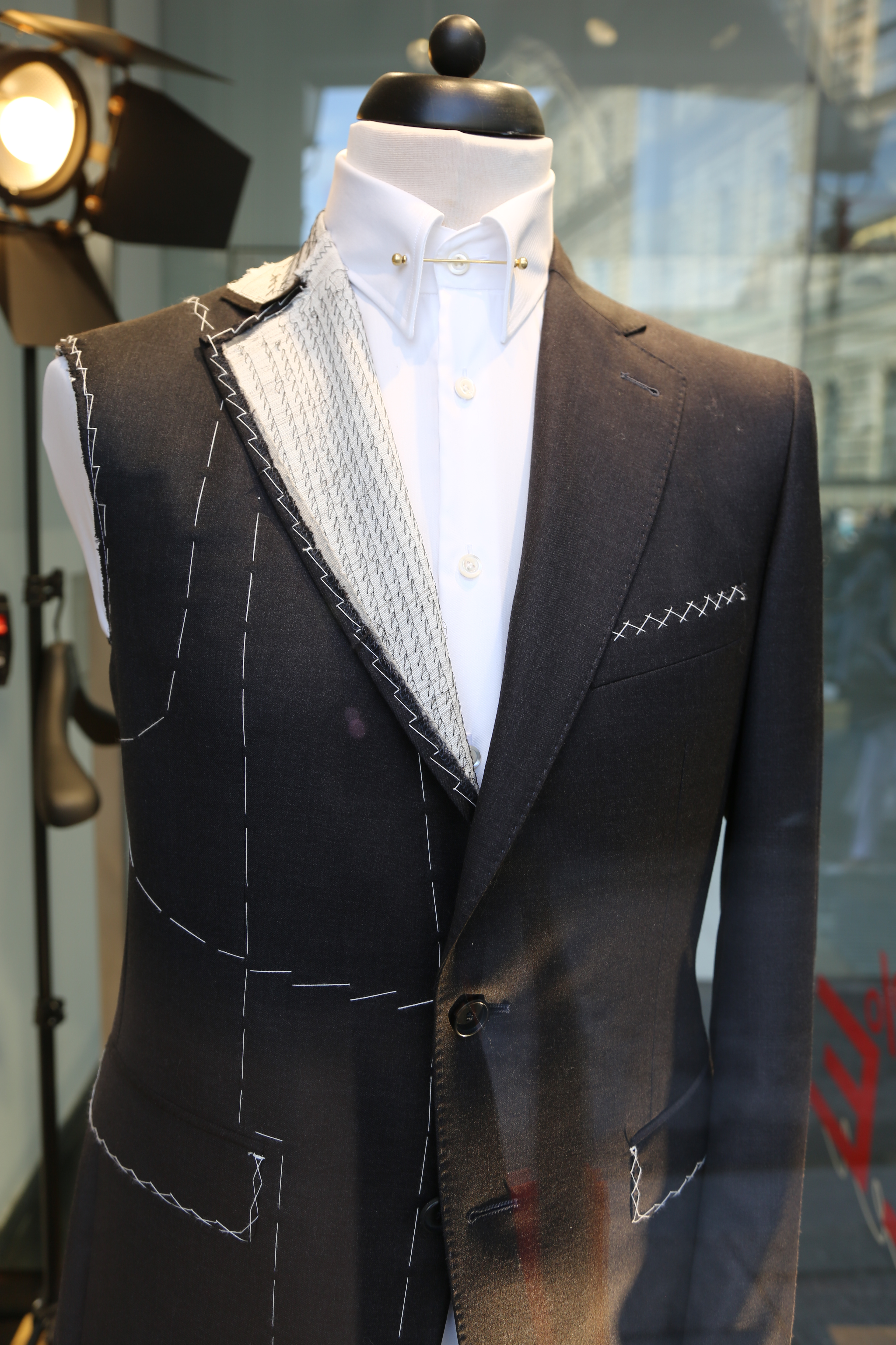 Herrenjackett, massgefertigt. Die Ganzeinlage in Front und Revers ist von Hand pikiert.